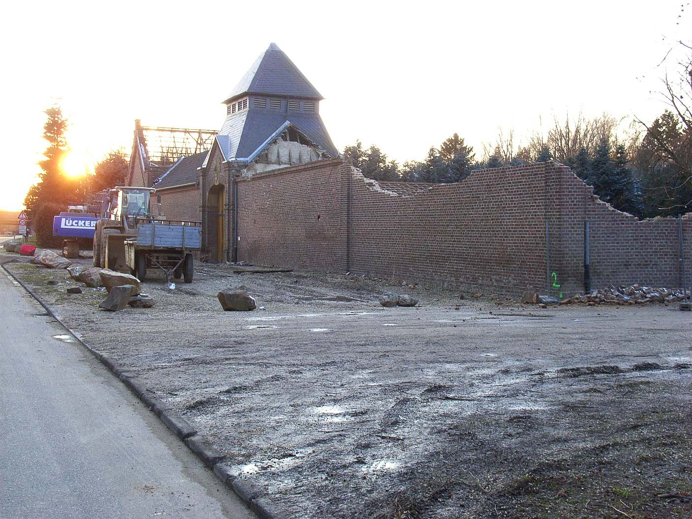 Abriss von Haus Pesch (Erkelenz, NRW), Vorbereitung für den Tagebau Garzweiler